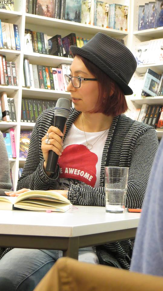 Adriana Popescu bei einer Lesung im Buchhaus Wittwer 2015